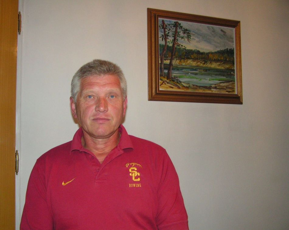 veslař Václav Vochoska, 2013